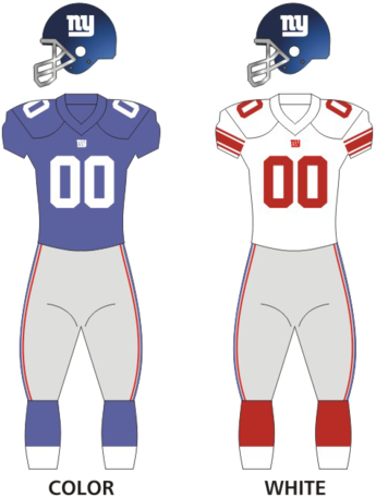 Uniformes Equipe NFL Giants de New York